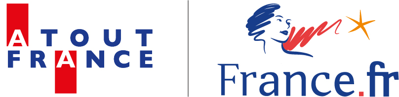 logo de Atout France, l'Agence de développement touristique de la France